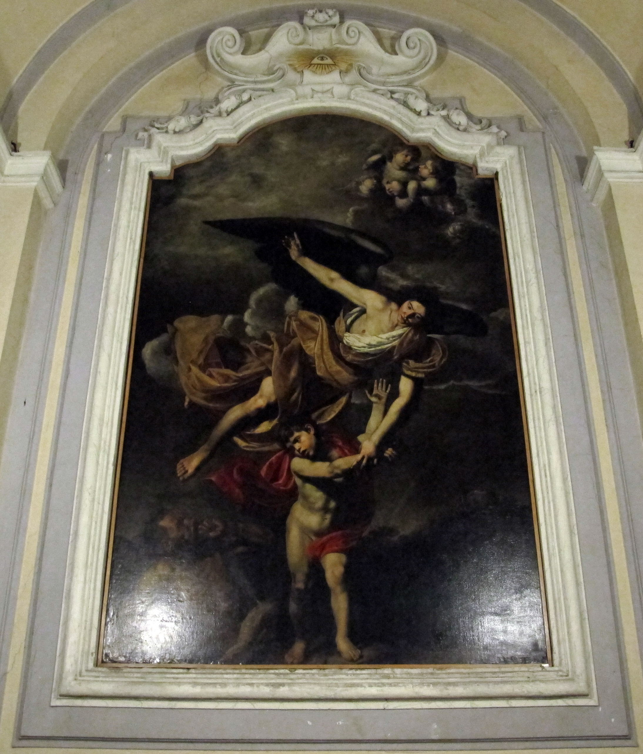 Angelo Custode